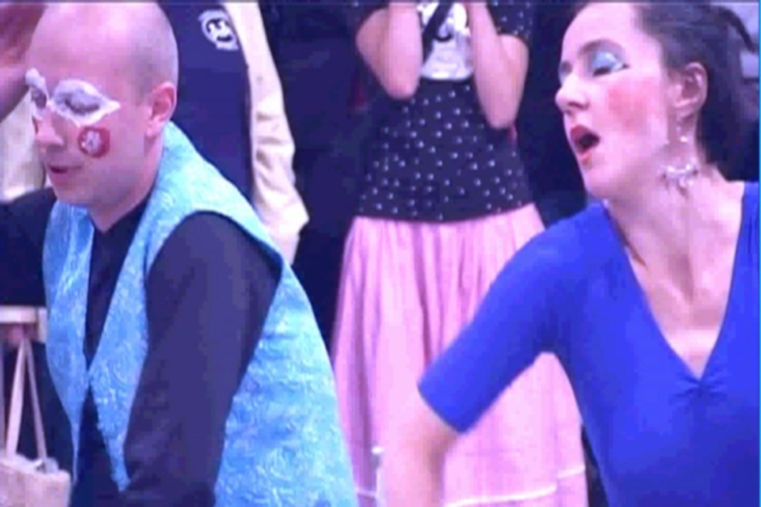 "European Performance Art Festival” CSW Zamek Ujazdowski, Warszawa, Polska